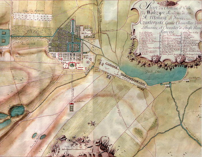 Беларуская (тарашкевіца): Воўчын (Voŭčyn), плян сядзібы Чартарыйскіх (Čartaryjski)